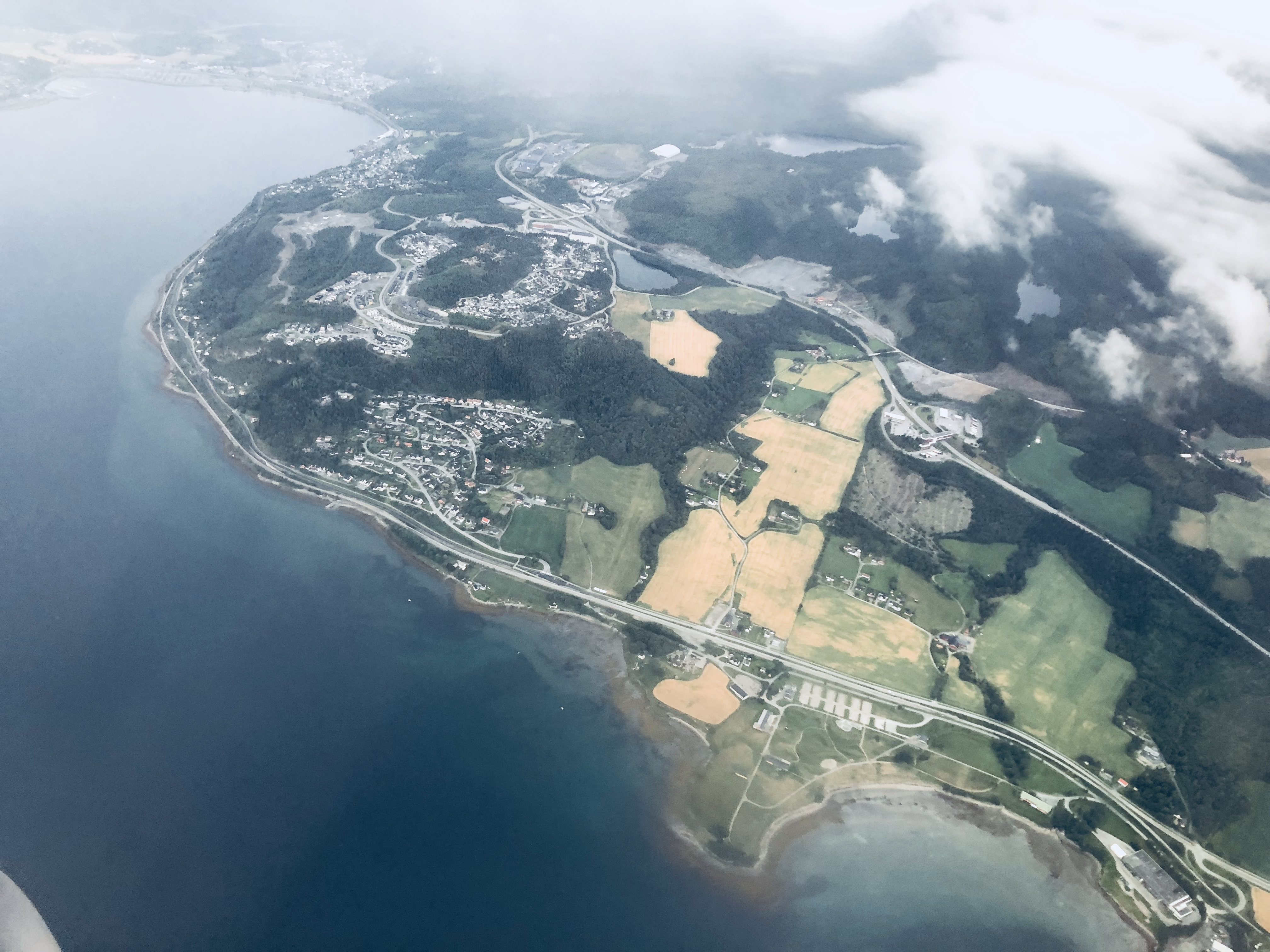 Midtsandan i Malvik kommune i Trøndelag.